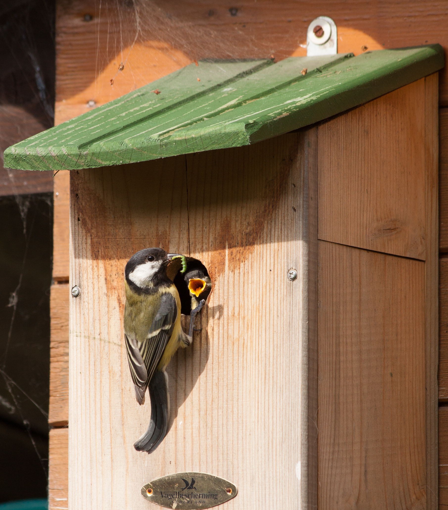 Koolmees